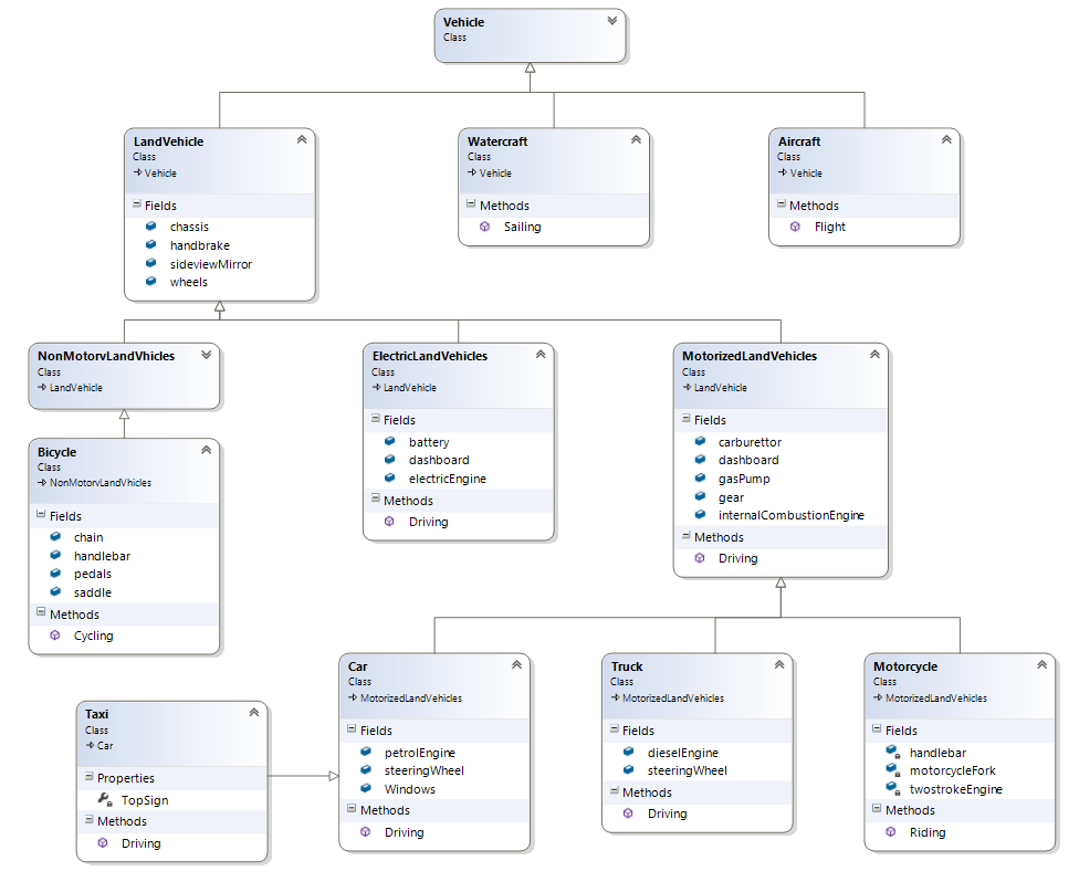 הדגמת ירושה בתכנות מונחה עצמים